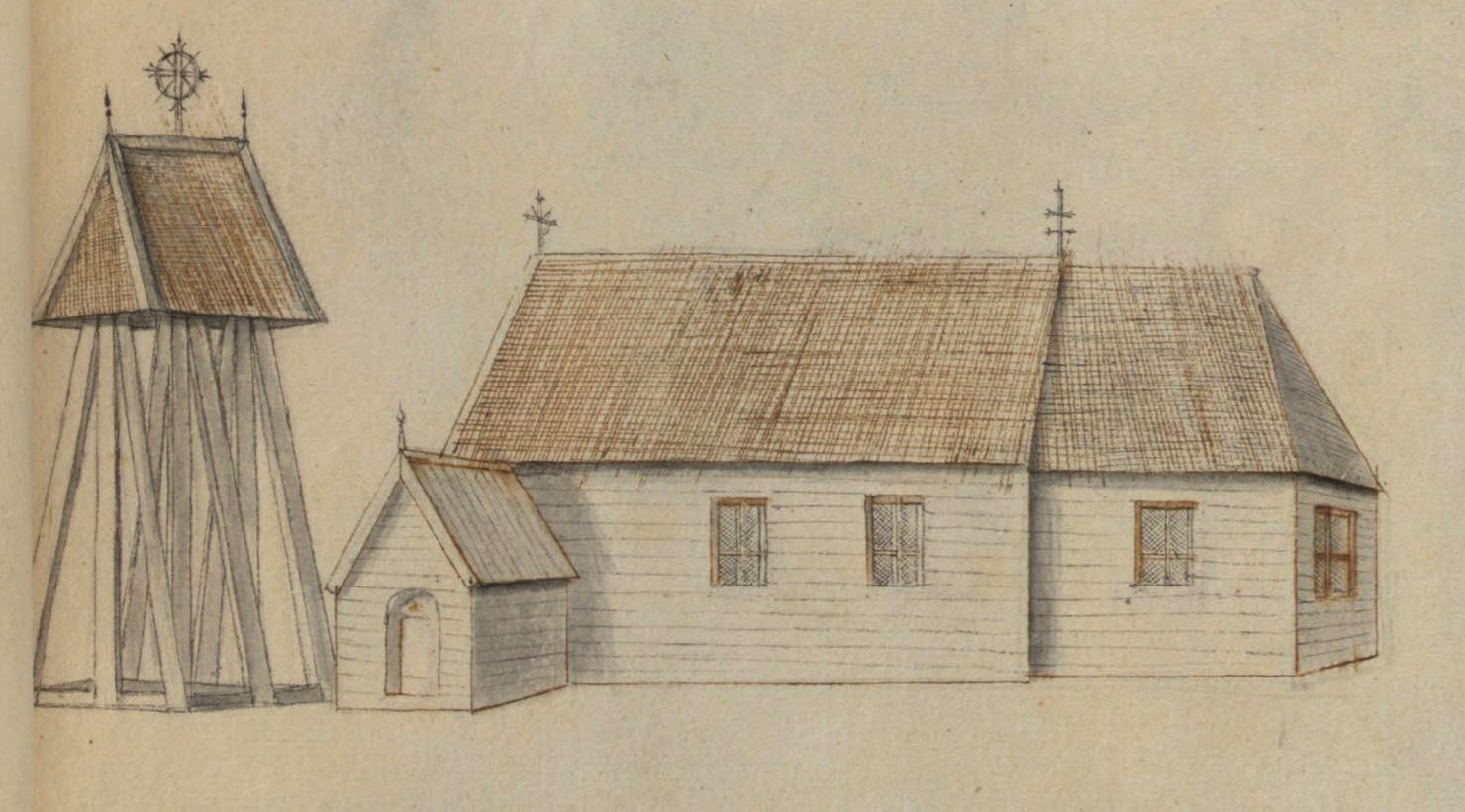 Björkängs kyrka Föregångare till Töreboda kyrka. Kyrka, äldre, teckning ur Peringskiölds Monumenta, avfotograferad i färg.